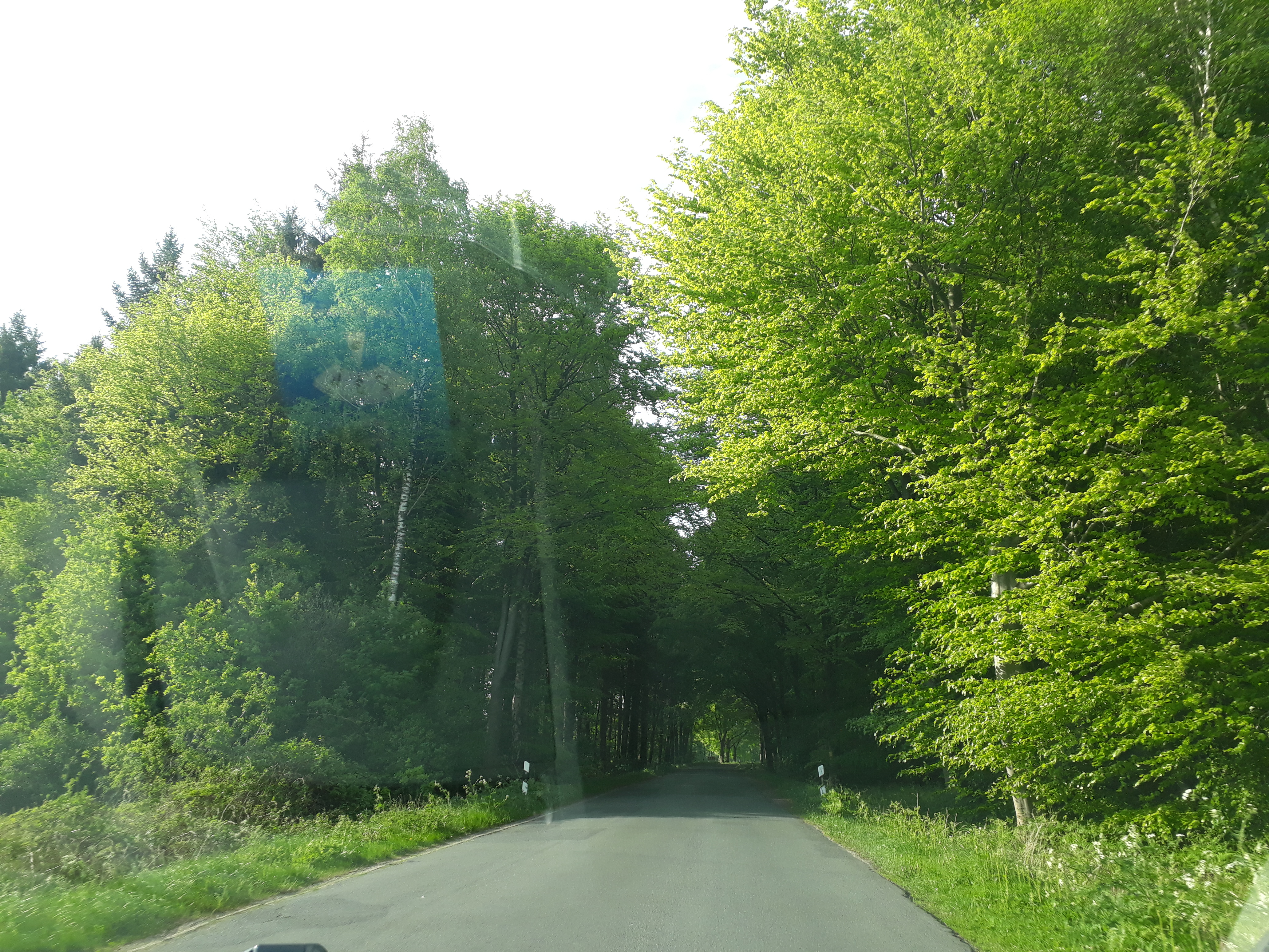 Braken, nahe Griemshorst, Harsefeld, Landkreis Stade.